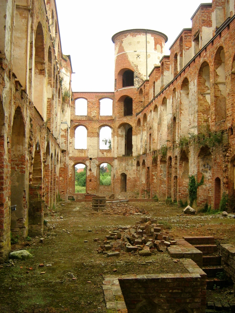 Mauern ohne Zwischendecken im hinteren Teil des Schlosses Dargun (Mecklenburg, Landkreis Nordvommern).